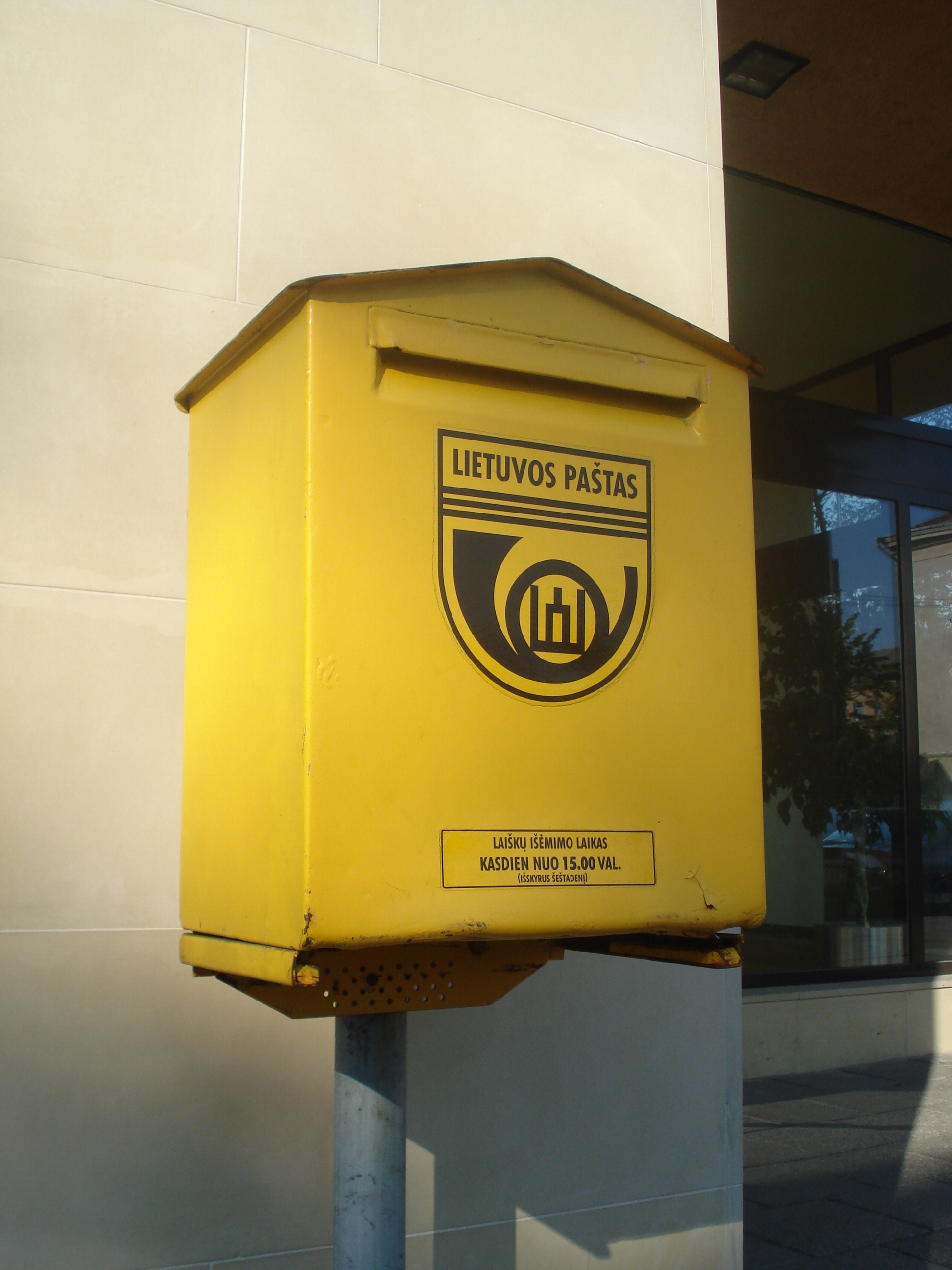 Standard Lithuanian mailbox in Vilnius